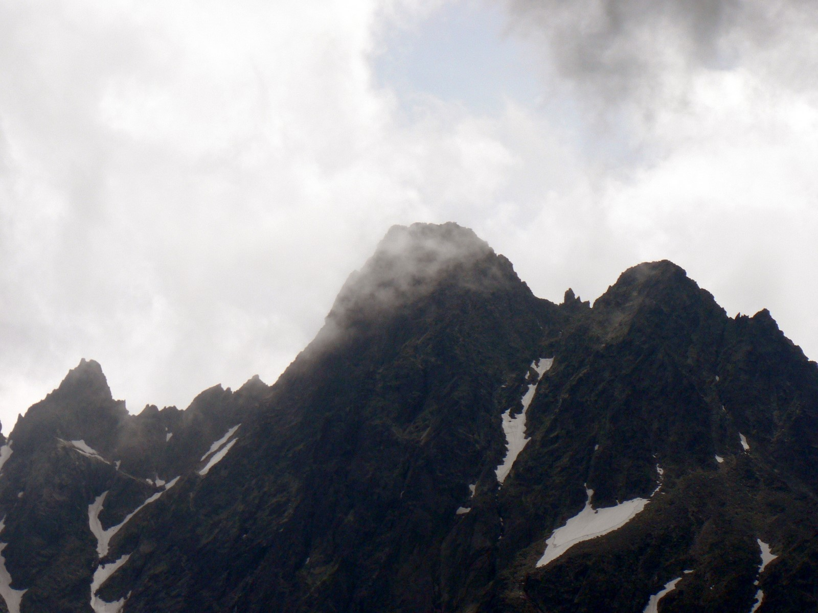 Durny i Mały Durny Szczyt znad Wielkiego Białego Stawu